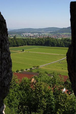 Ausblick von der Habsburg nach Lupfig (Nr. 03.1-5050)